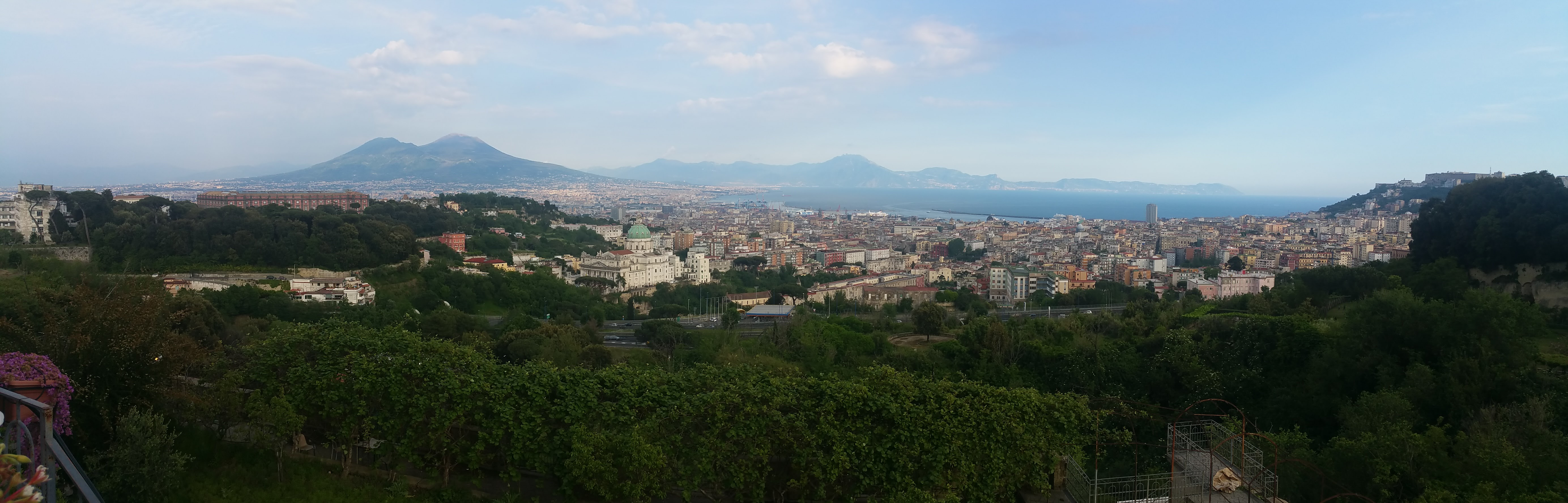 Napoli dai Colli Aminei